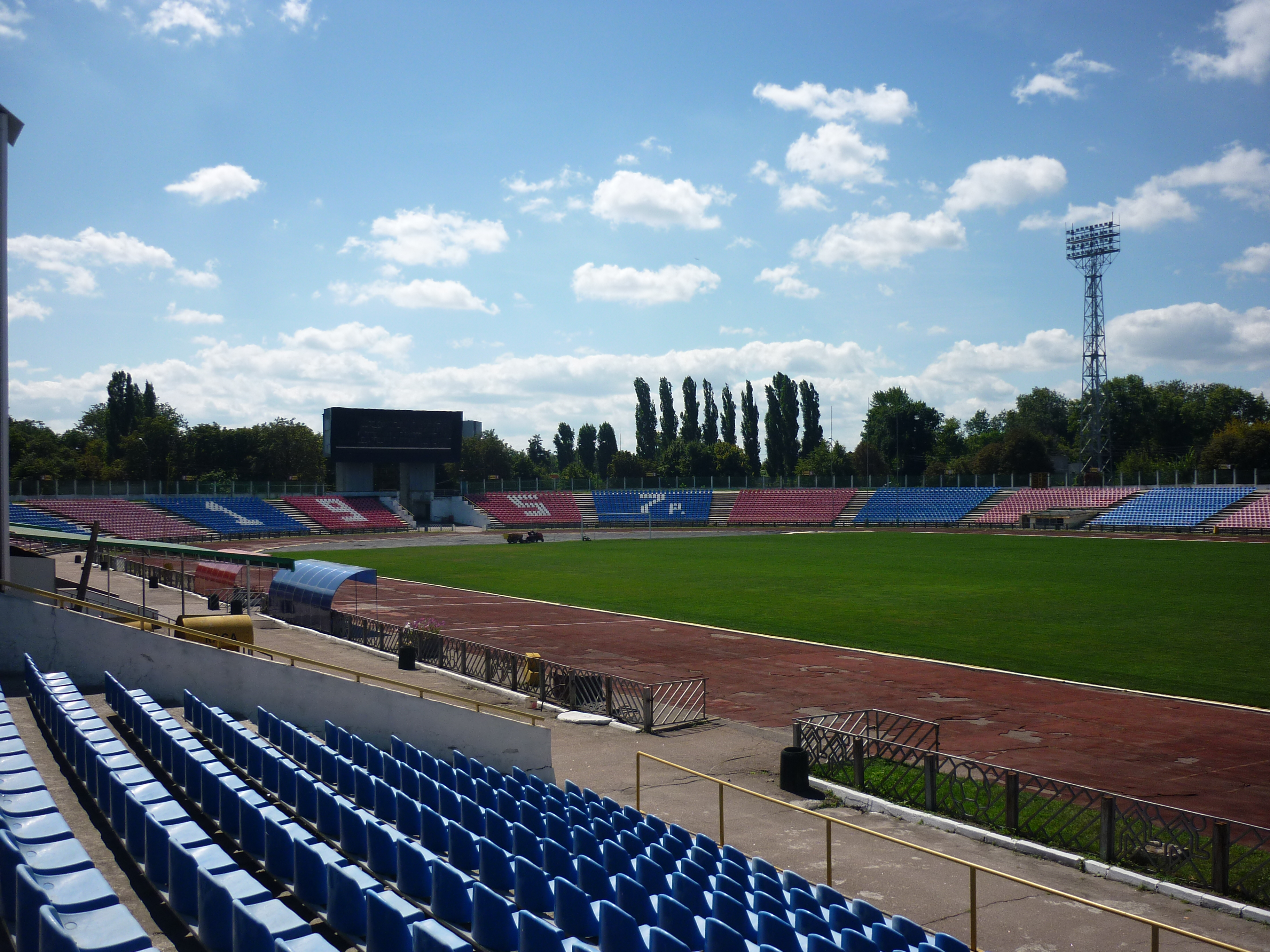 Стадіон "Центральний" в місті Черкаси. Поле